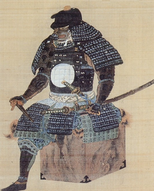 佐竹義宣。Satake Yoshinobu.